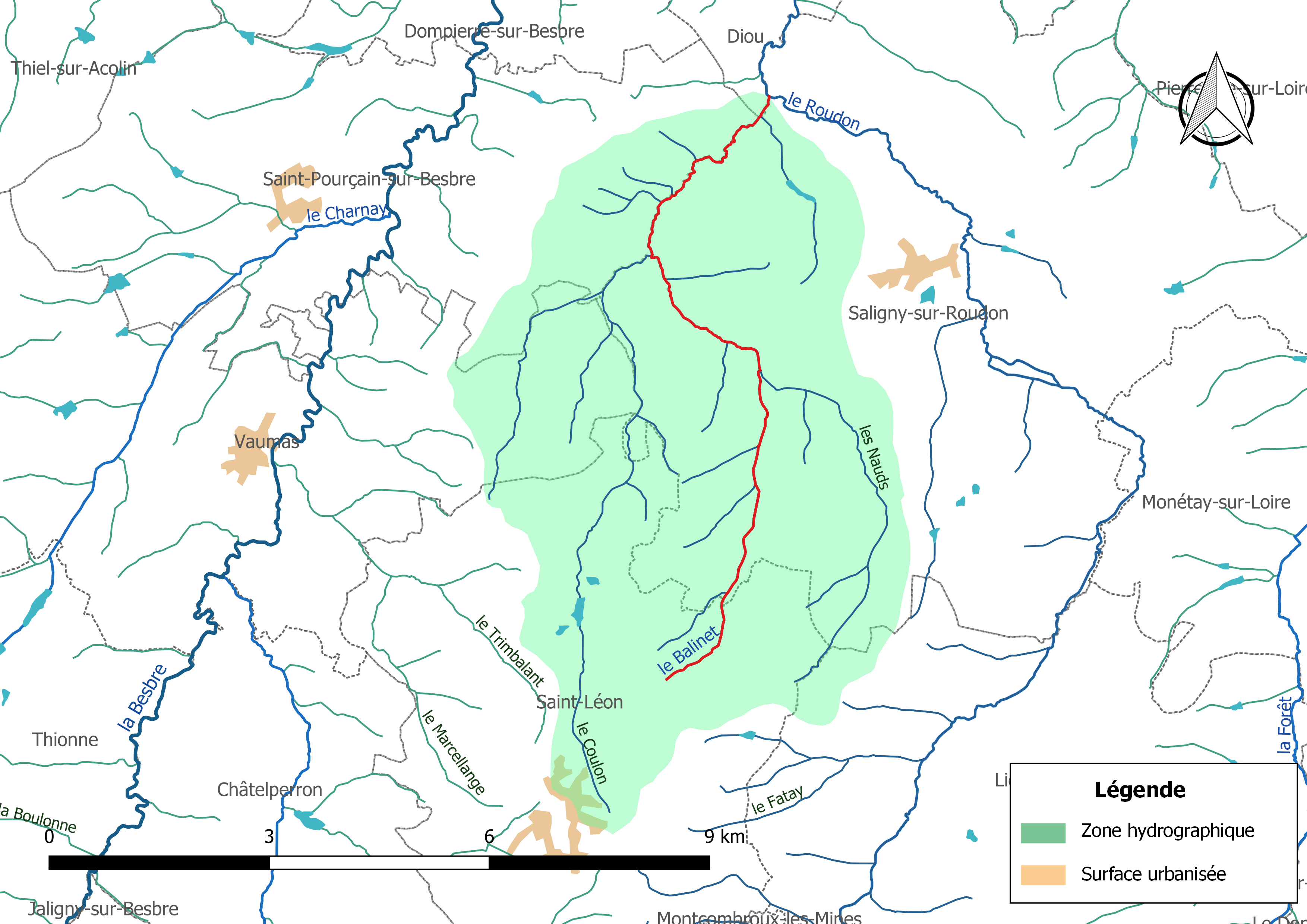 Carte du cours d'eau « le Balinet » (France) et de la zone hydrographique dans laquelle il s'insère.